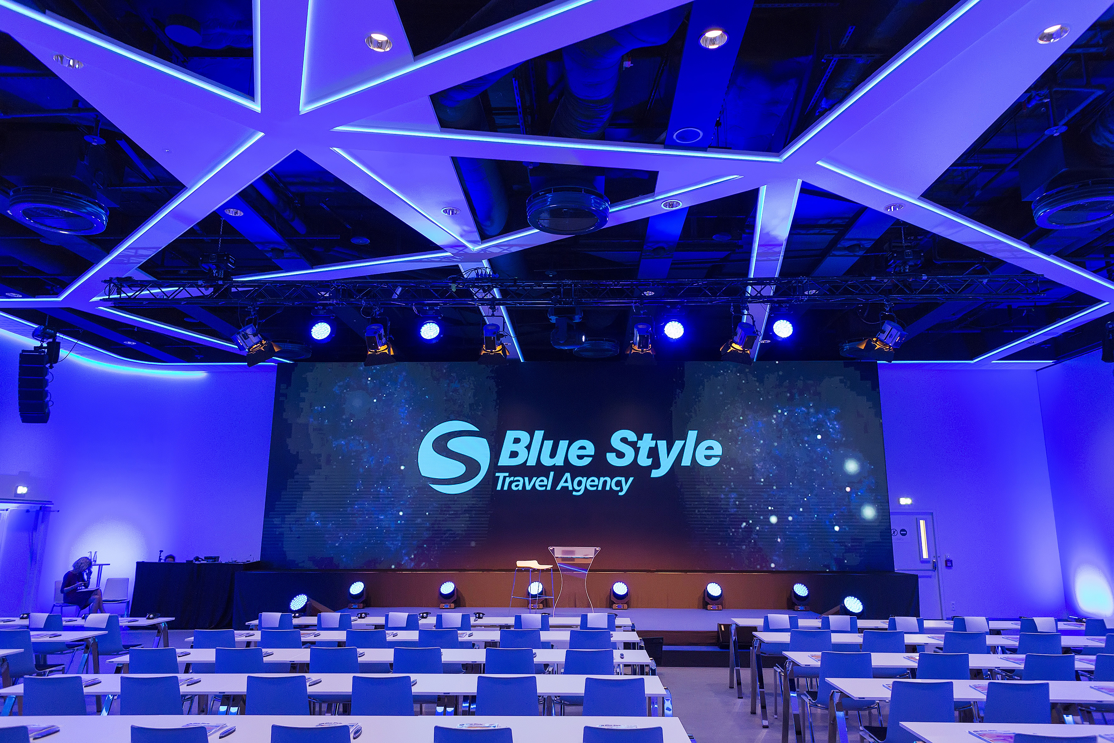 Cubex Centrum Praha